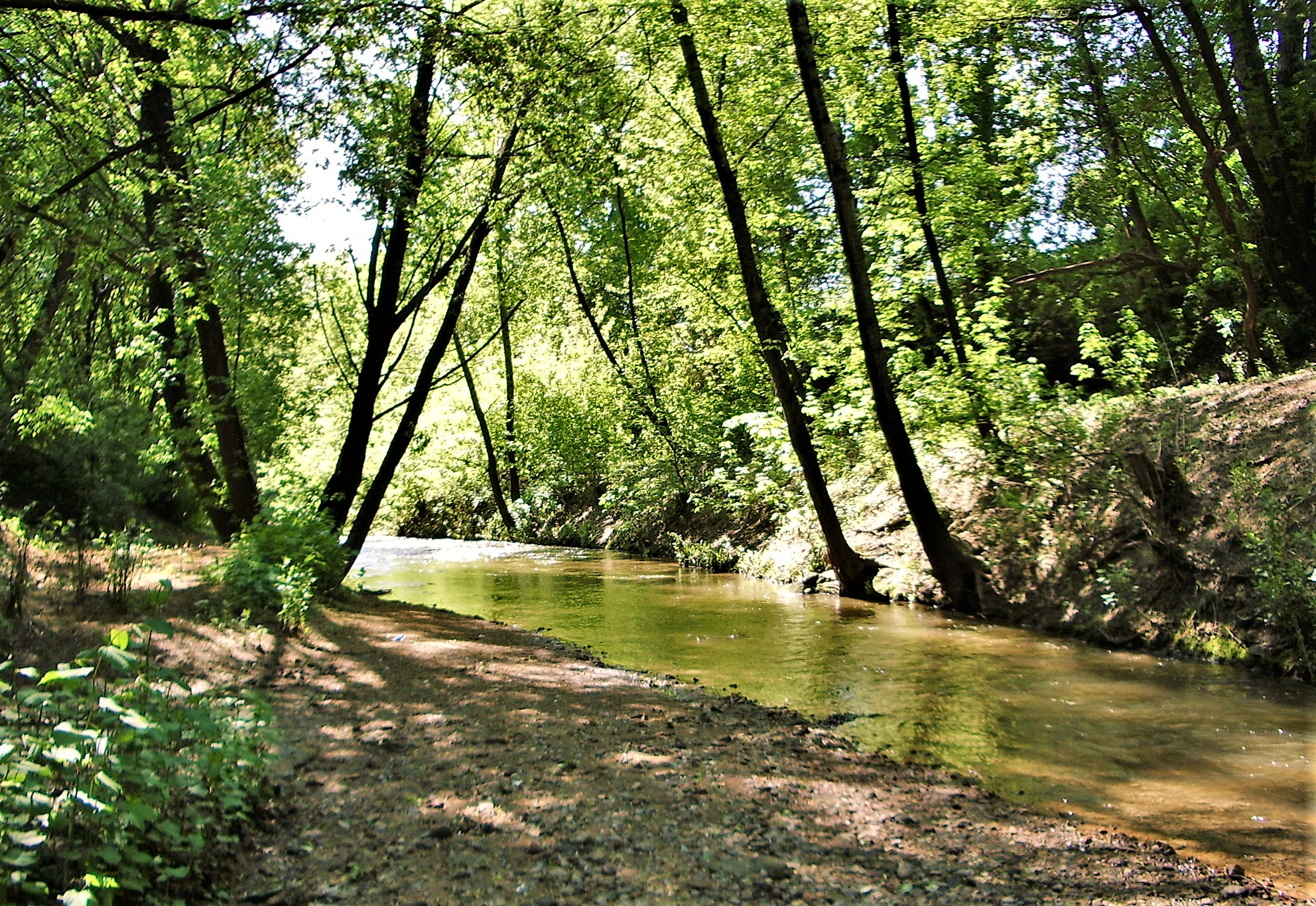 Открытый участок реки Таракановки